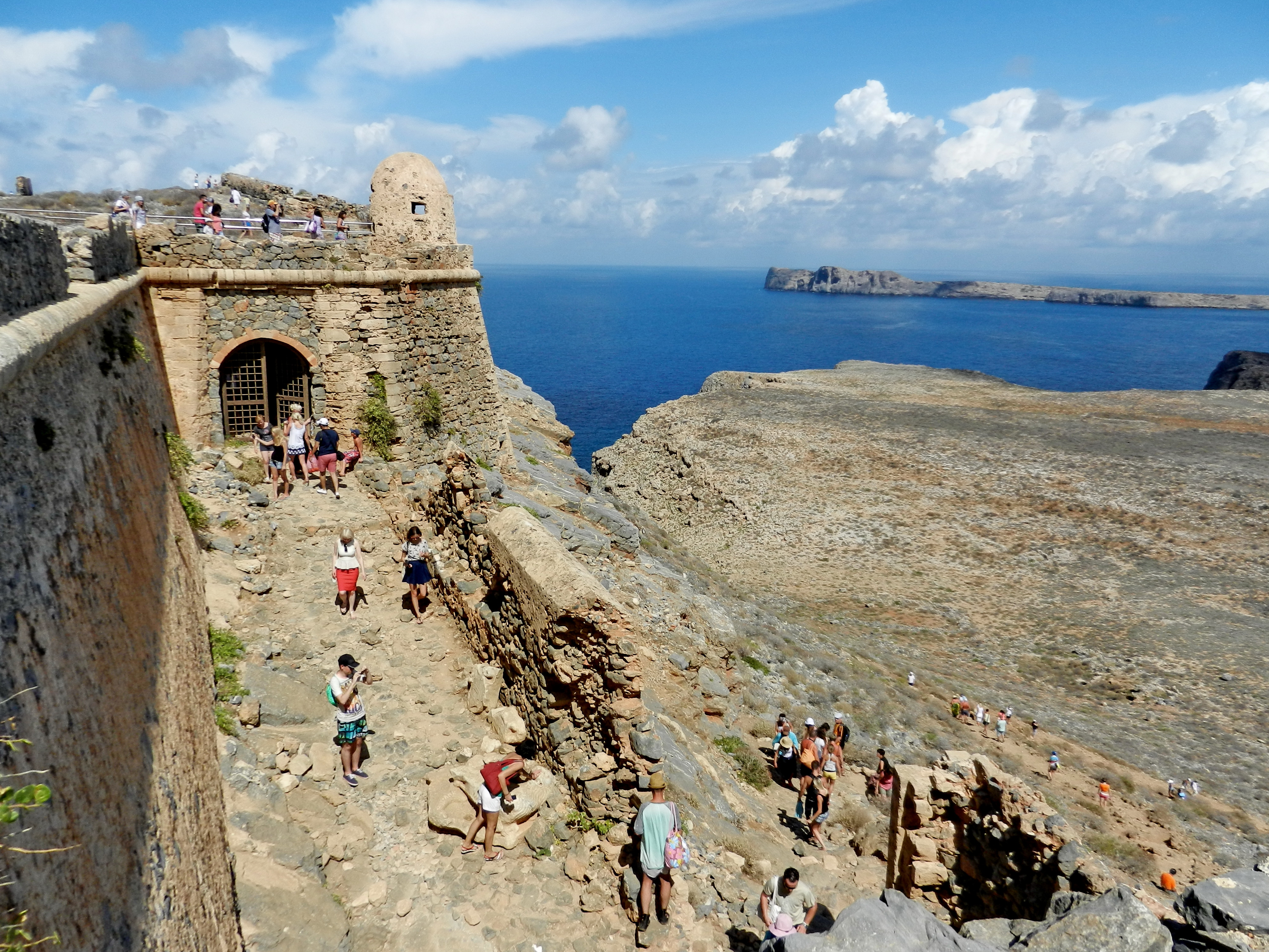 Gramvousa